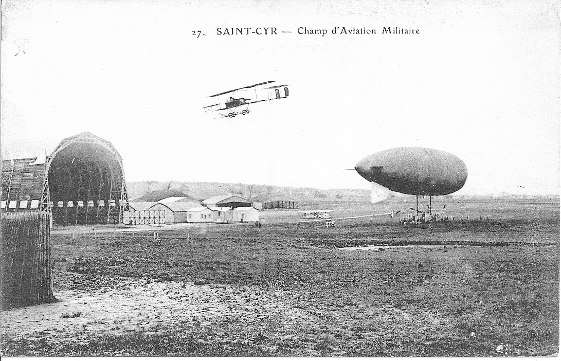 27. SAINT-CYR -- Champ d'Aviation Militaire (Aérodrome de Saint-Cyr-l'École (Yvelines) depuis 1945), carte postale ancienne datant des années 1907/1910.